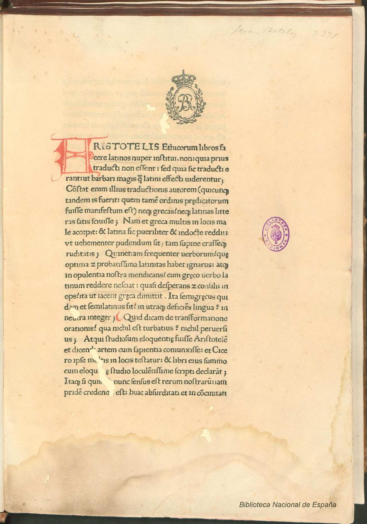 Ethica ad Nicomachum. Politica. Oeconomica trad. Leonardo Aretino Autor: Aristóteles Fecha: 1473 Datos de edición: [Enrique Botel, Jorge von Holtz y Juan Planck] Resumen: Estamos ante la traducción del griego al latín de las tres obras aristotélicas hechas por Leonardo Bruni de Arezzo. Originario de Arezzo, Bruni se traslada a Florencia en 1413 donde entabla relación con el círculo de humanistas florentinos. Fue uno de los mejores escritores en latín de su época y contribuyó en gran manera al renacimiento de la enseñanza del latín y del griego en la Italia del siglo XV. Más que ningún otro autor, Bruni hizo accesibles los textos del mundo helénico a los estudiosos latinos mediante sus traducciones al latín de las obras de autores griegos. Entre ellas pueden mencionarse sus traducciones de Aristóteles, Platón, Plutarco y Demóstenes que fueron consideradas modelos de pura latinidad. Será este un texto de uso frecuente en las universidades del siglo XV y en los ambientes humanísticos en general. Circuló en copias manuscritas hasta la invención de la imprenta, momento en el que será ampliamente impreso por distintos talleres. La edición de Barcelona de 1473 es la primera de las obras impresas por la sociedad formada por los tipógrafos alemanes Botel, Planck y Holtz, aunque algunos autores la creen impresa en Zaragoza